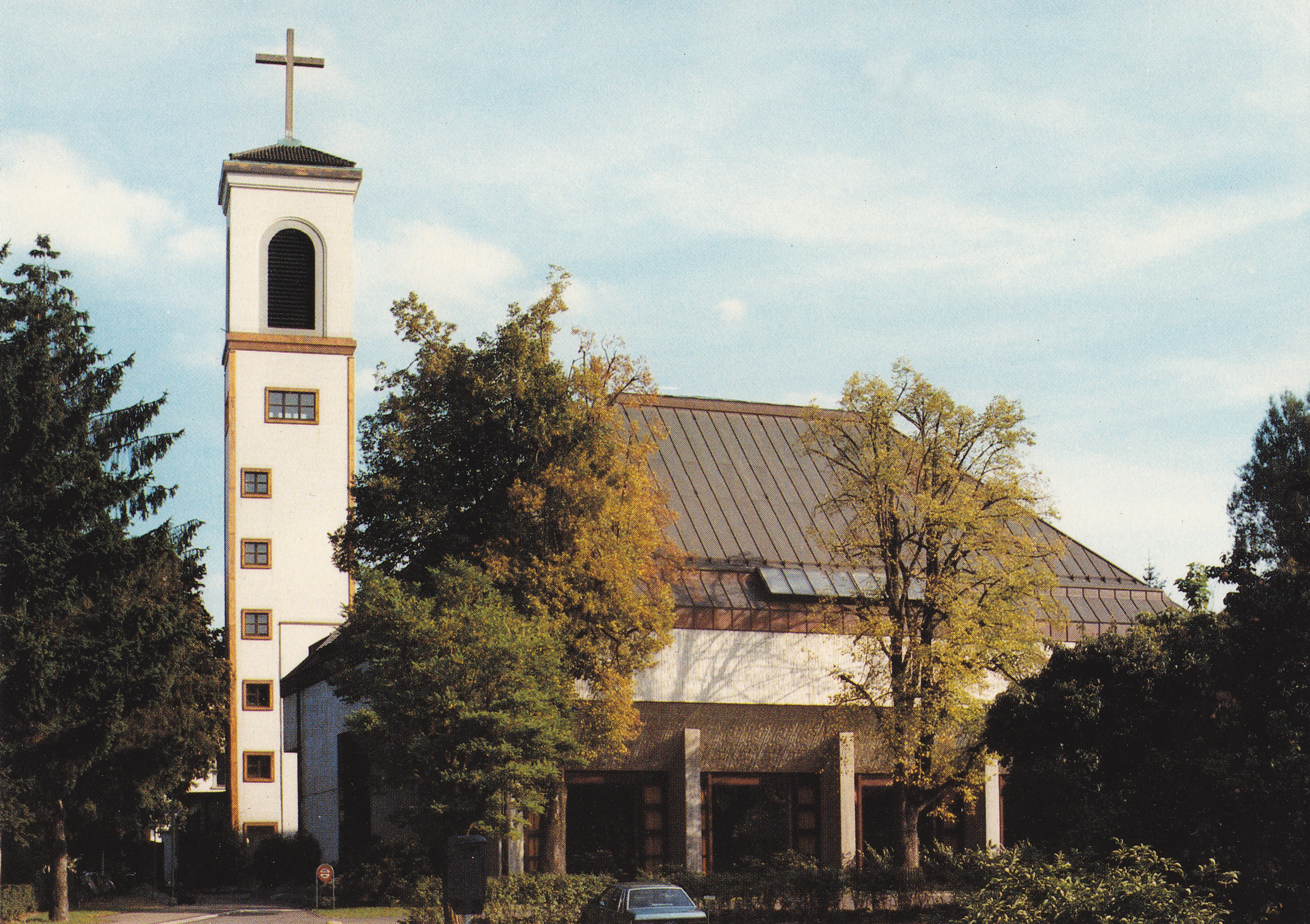 Römisch-katholische Pfarrei Heilig Kreuz Zürich-Altstetten, Ansicht der Kirche von Westen